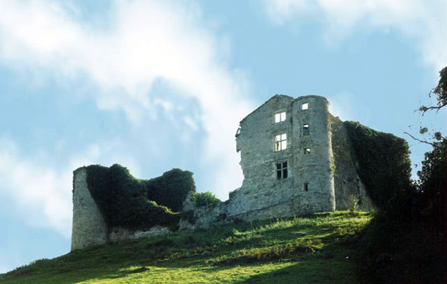 Ruines du chateau de Belzunce Pyrénées).